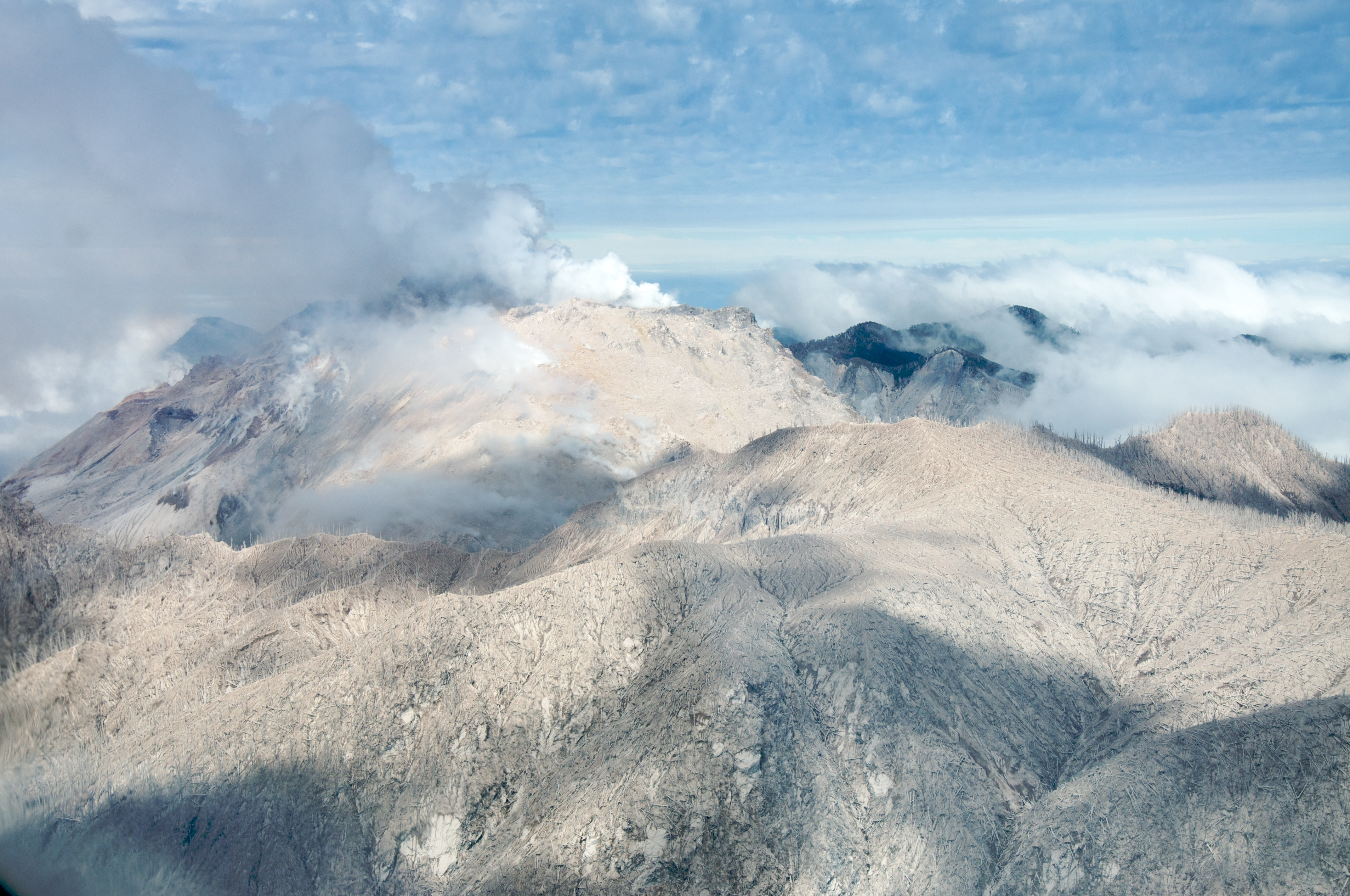 Bosque cerca Chaitén 7